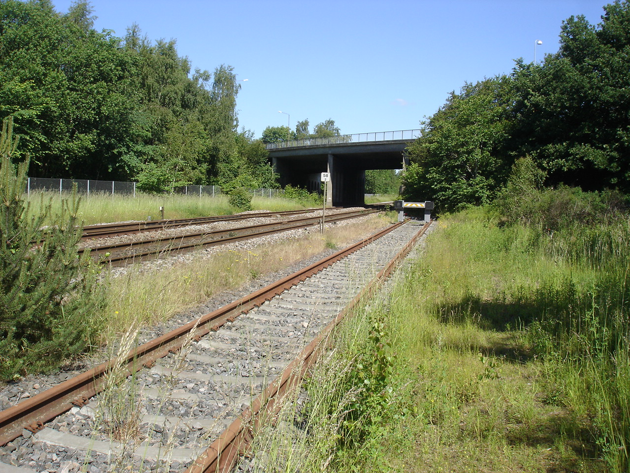 Viadukten under Silkeborgvej i Horsens - her lå Bygholm trinbræt